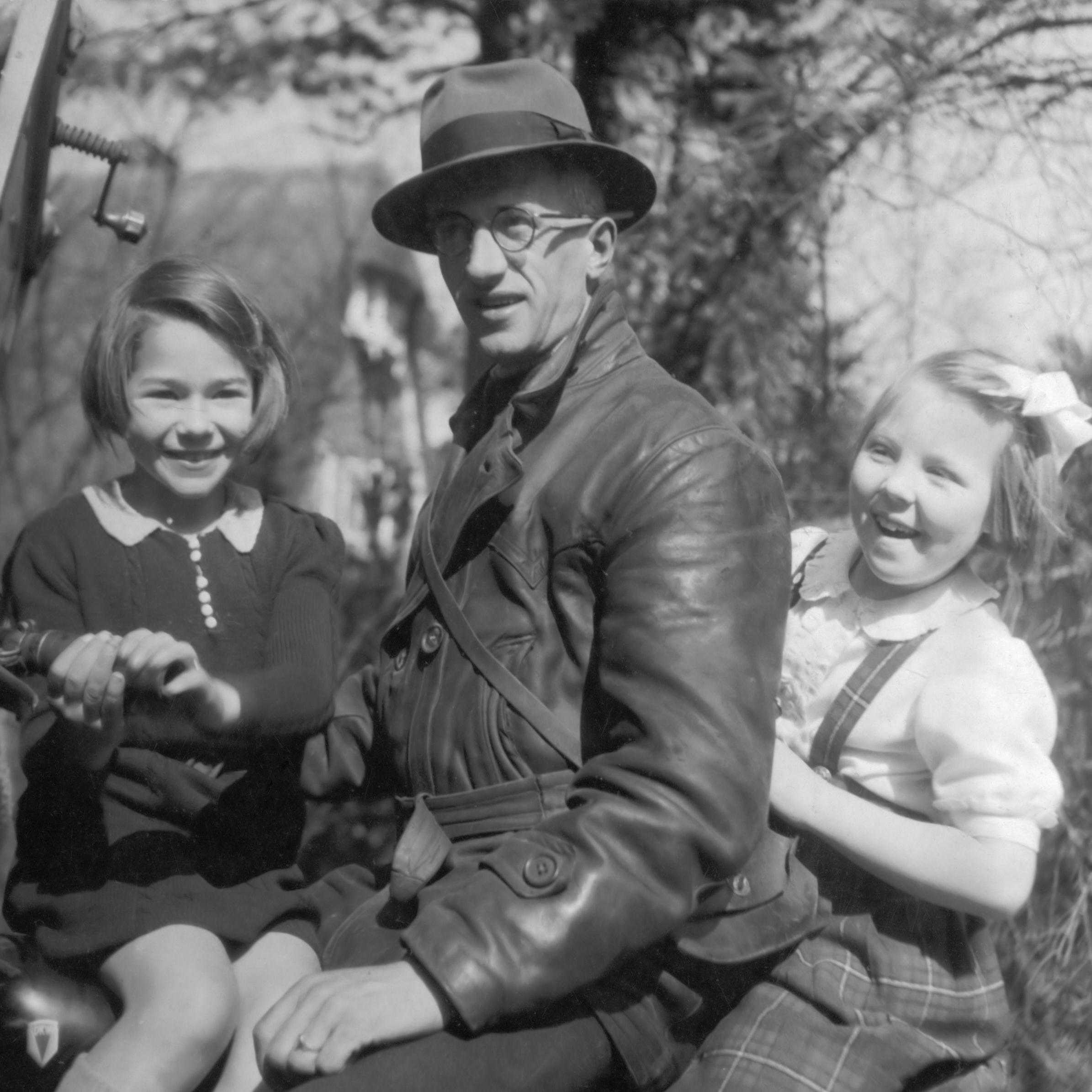 koninklijk huis, prinsessen, kinderen, spelen, Beatrix, prinses, Boeke K. 16 augustus 1946